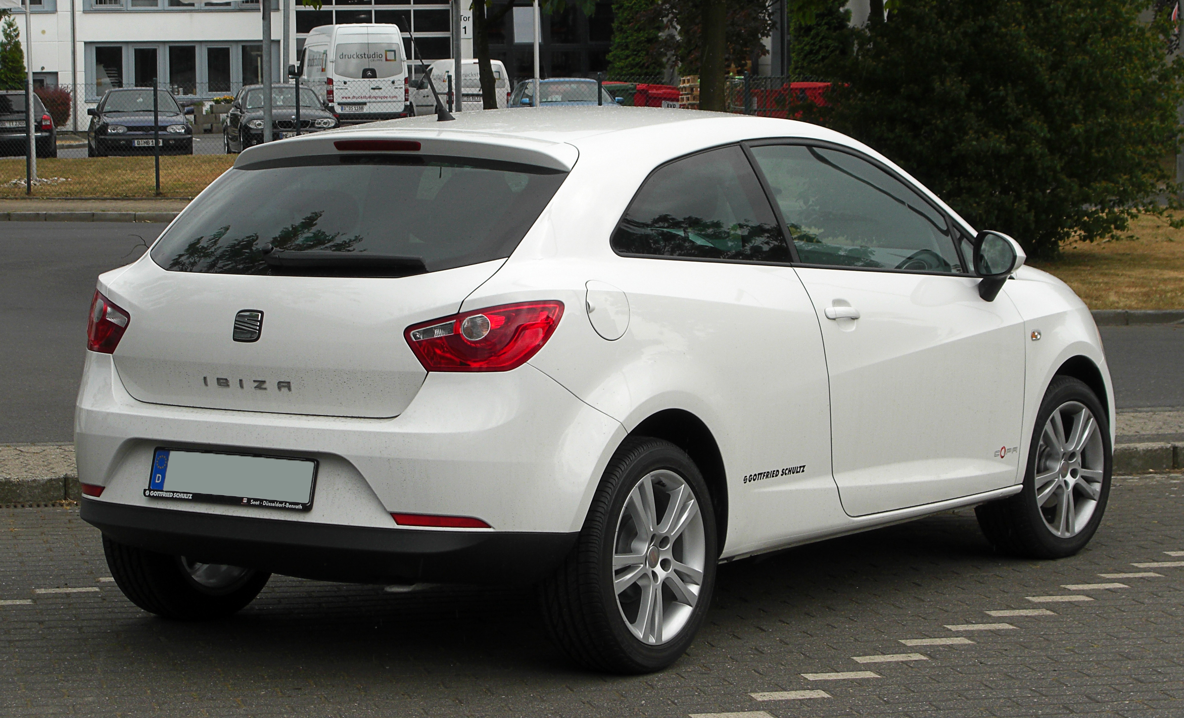 Seat Ibiza SC Copa (6J)